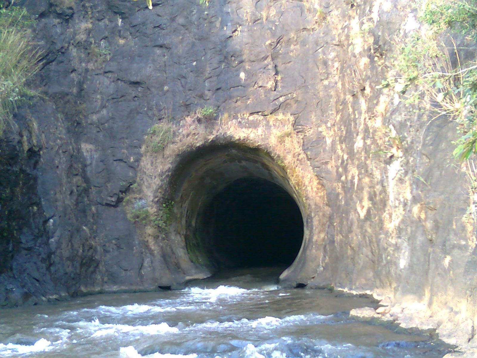 ഇടുക്കി അണക്കെട്ടിന്റെ വൃഷ്ടിപ്രദശത്തേക്ക് ജലമൊഴുകിയെത്തുന്ന അഞ്ചുരുളിയിലെ തുരംഗം